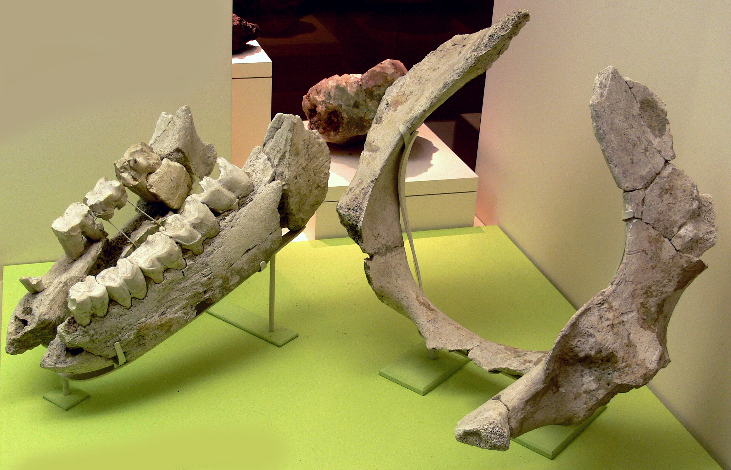 Schaffhausen, Museum zu Allerheiligen, Dauerausstellung zur Naturgeschichte Unterkiefer und Beckenfragment eines Waldnashorns, gefunden in Flurlingen